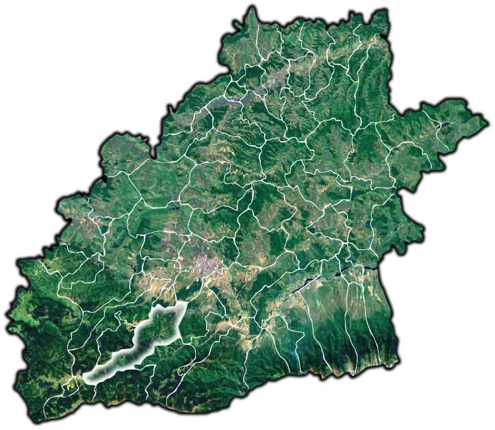 Rasinari jud Sibiu.png